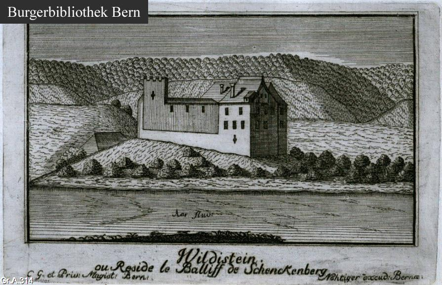 Schloss Wildenstein von Süden.